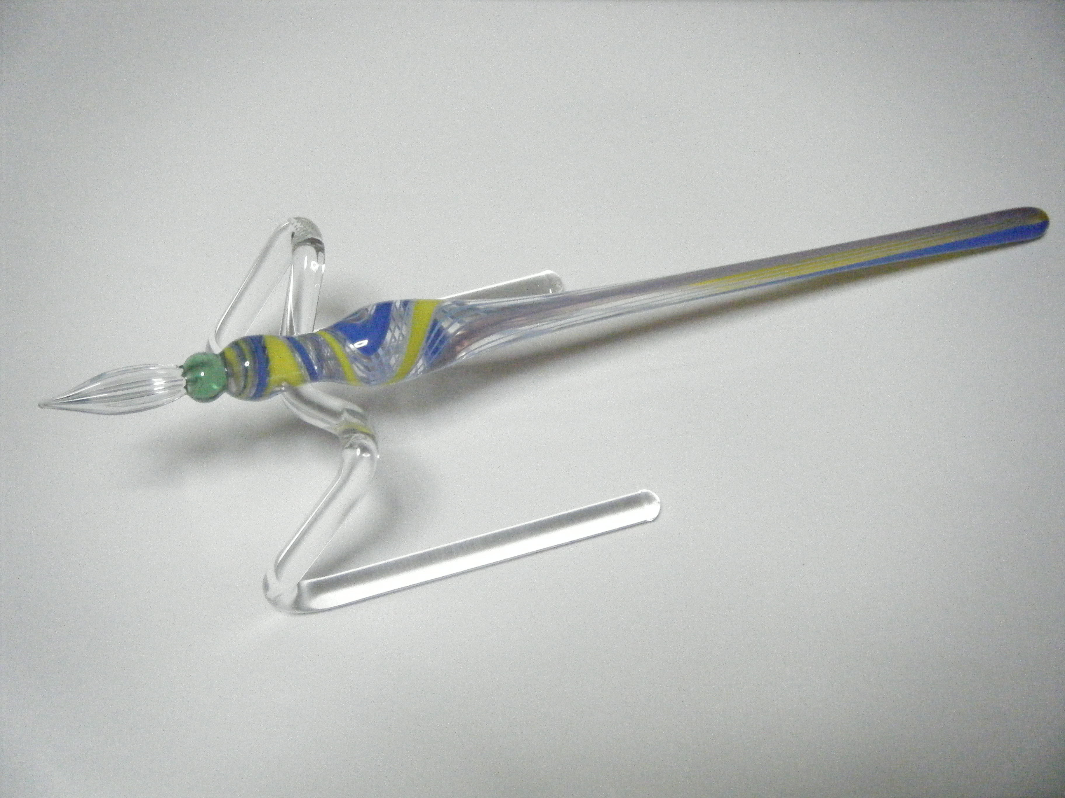 ガラスペン全体（北海道小樽市 北一硝子にて購入）